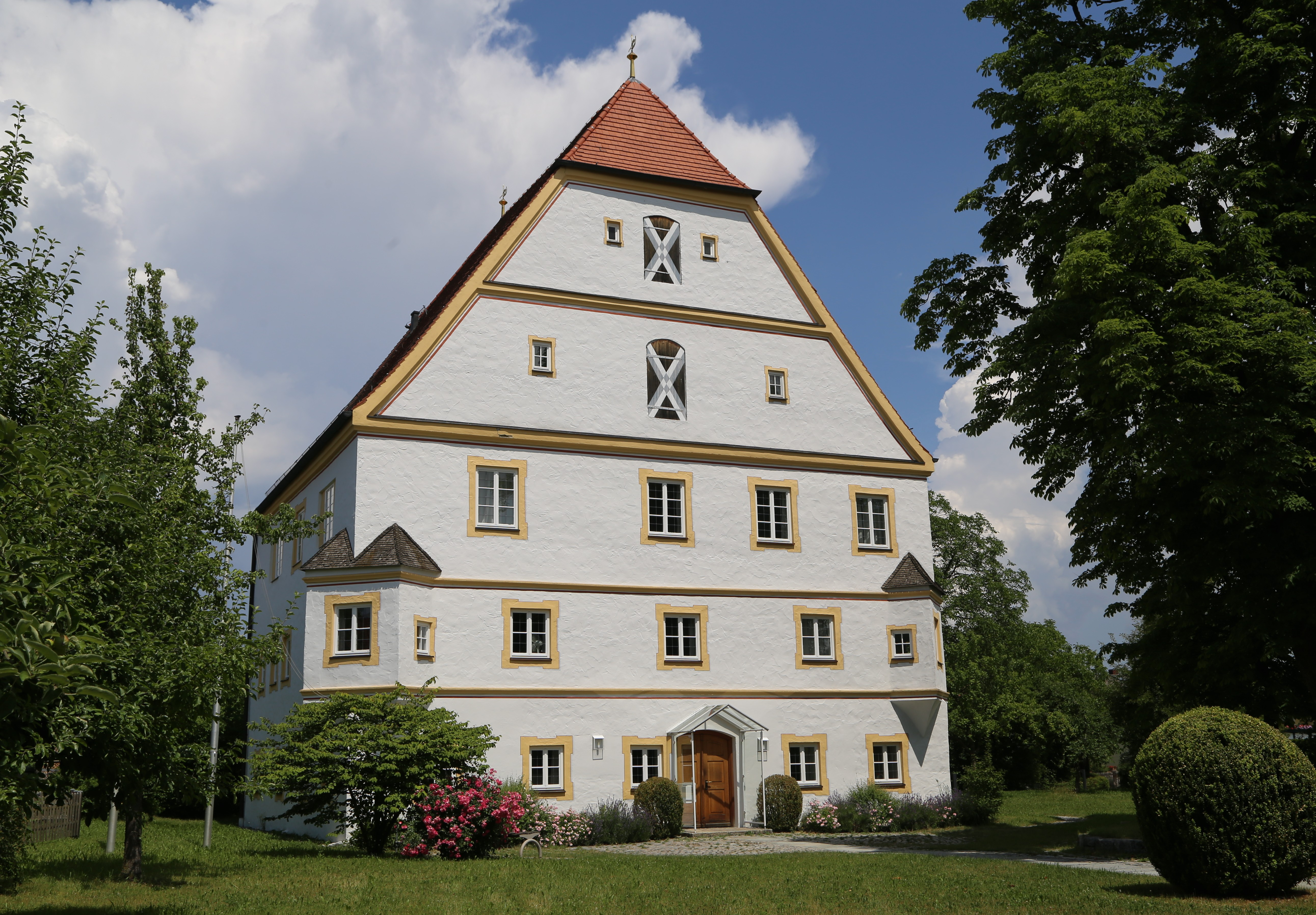 Rosenheimer Straße 13, Schechen; ehemaliges Schloss, seit 1978 Rathaus, zuvor Gasthaus, dreigeschossiger Bau mit steilem Krüppelwalmdach und zwei über Eck gestellten Erkern am Obergeschoss, 2. Hälfte 16. Jahrhundert